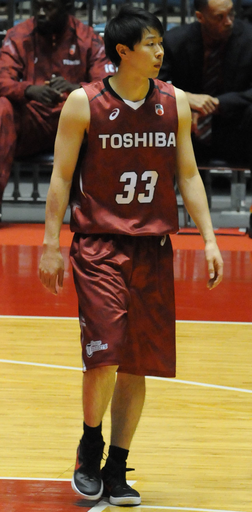 東芝ブレイブサンダース、長谷川技選手。代々木第一体育館で。